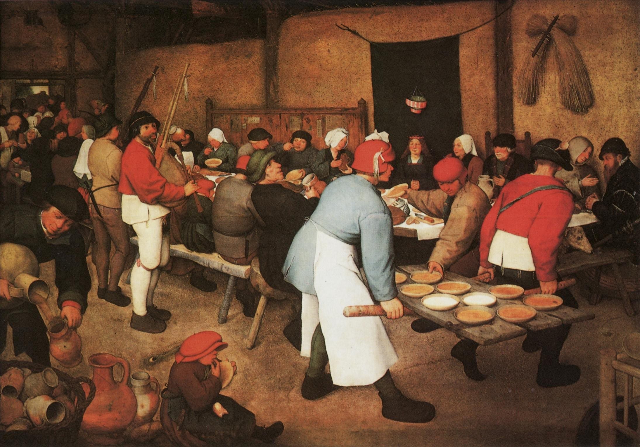 Darstellung einer Bauernhochzeit. Gemälde von Pieter Bruegel